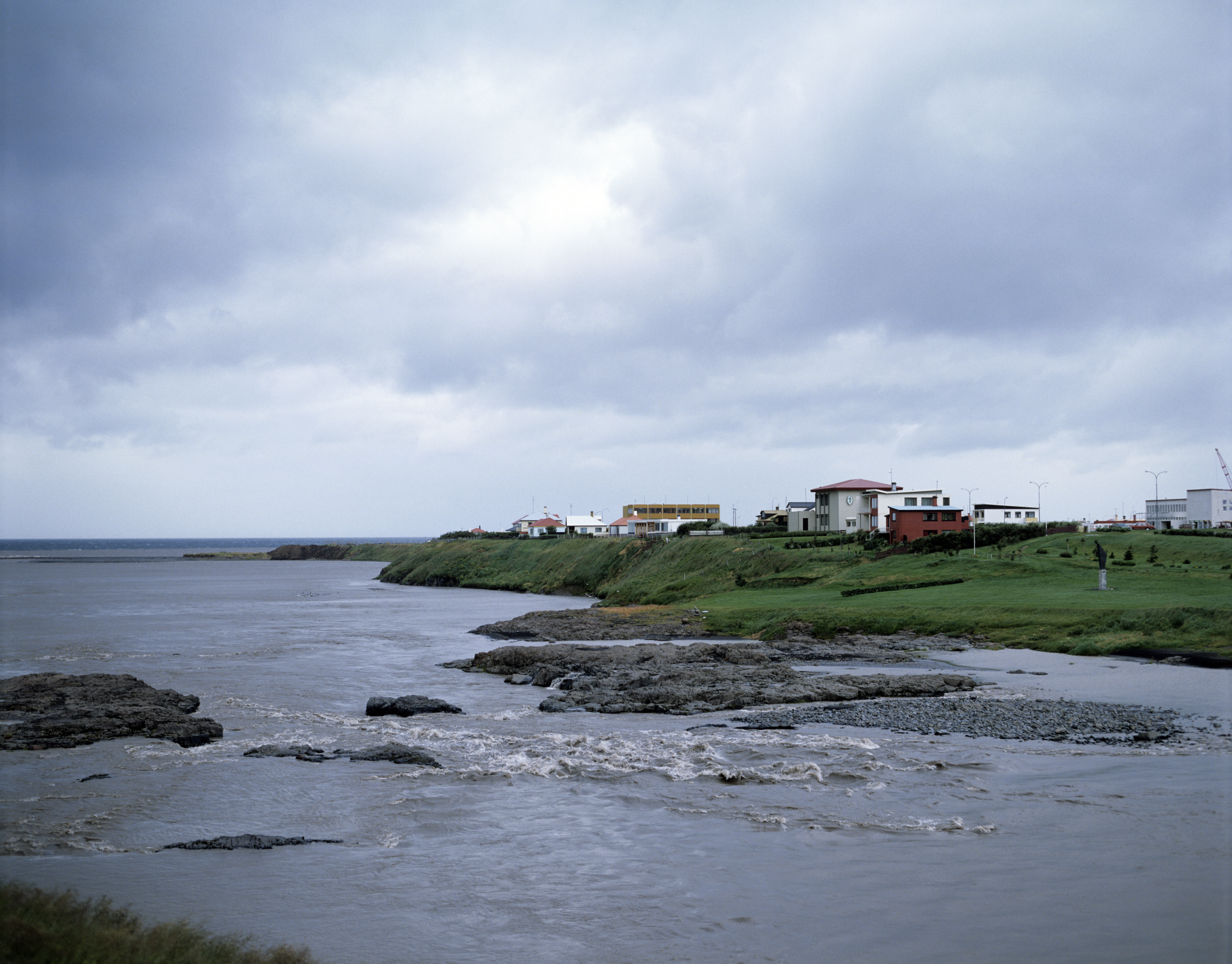 Blönduós.